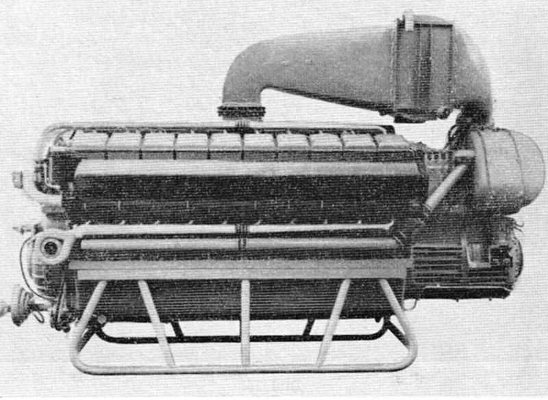 Daimler Benz high speed diesel engine type MB 518/3